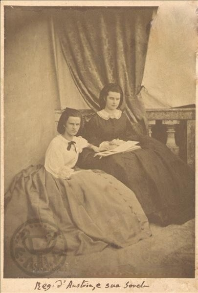 Hélène (à gauche) et sa soeur Sissi.